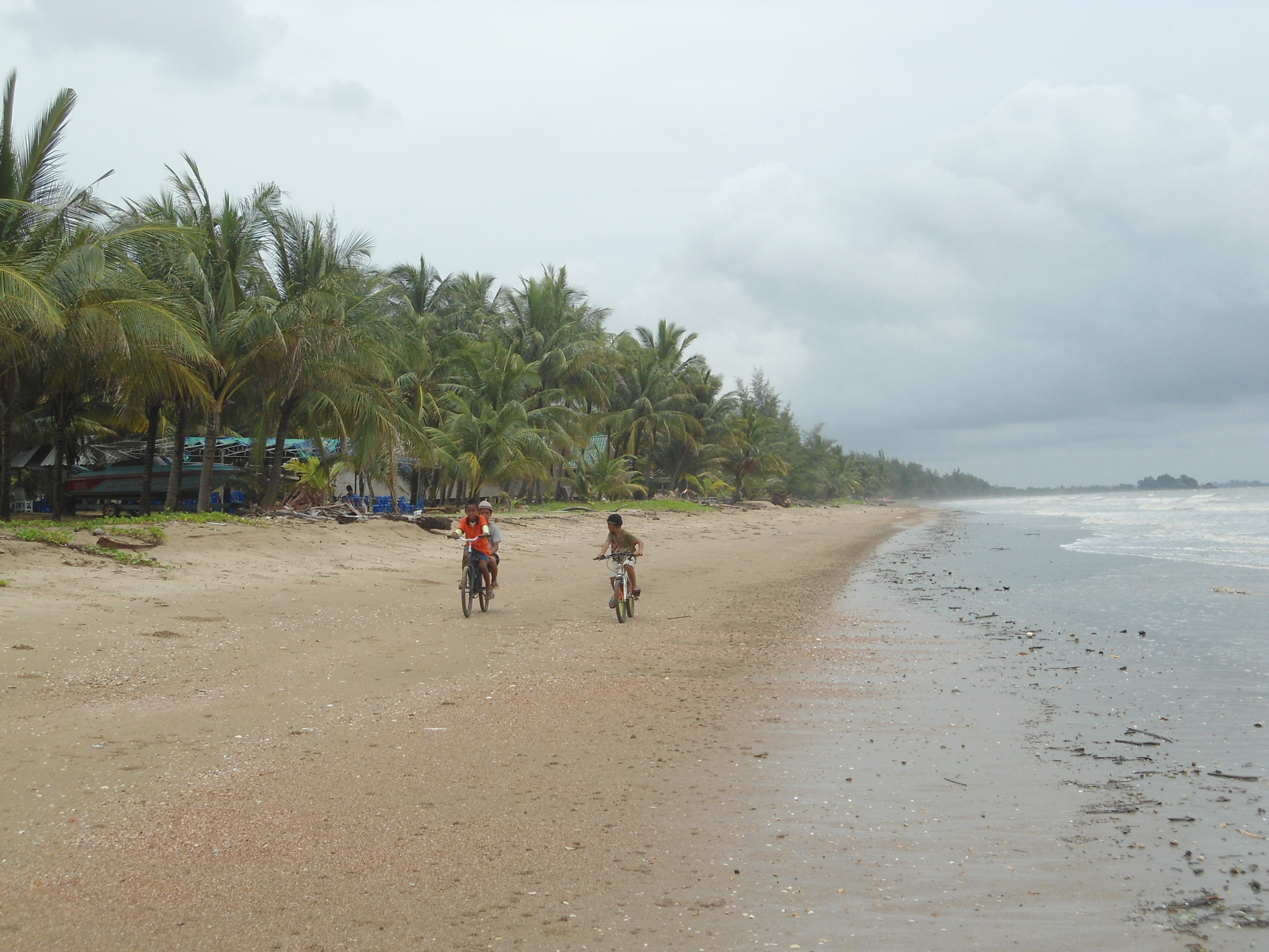 ชายหาดแหลมสิงห์ อำเภอแหลมสิงห์ จังหวัดจันทบุรี